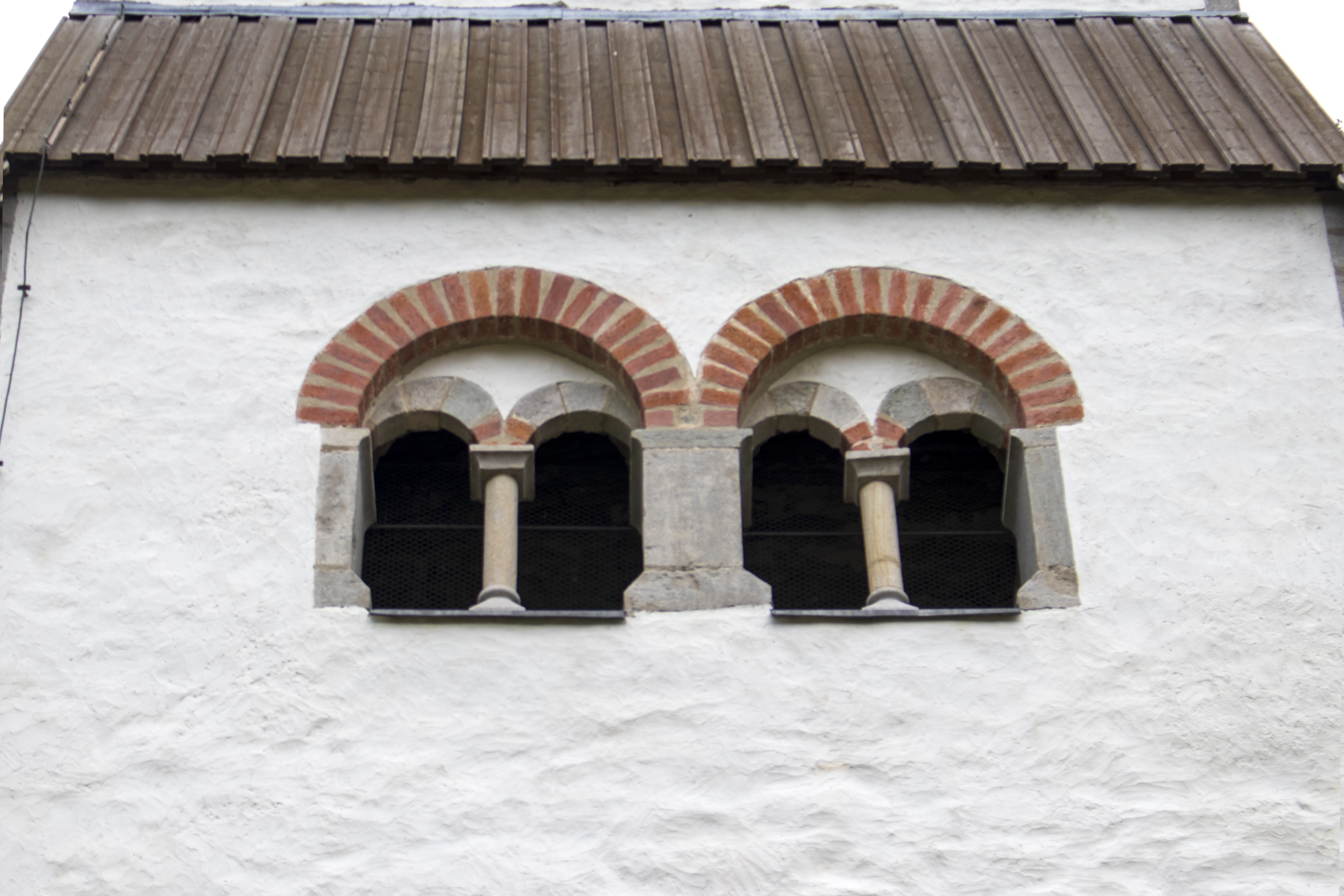 Fiestras na torre da igrexa de Lye, na illa sueca de Gotland.